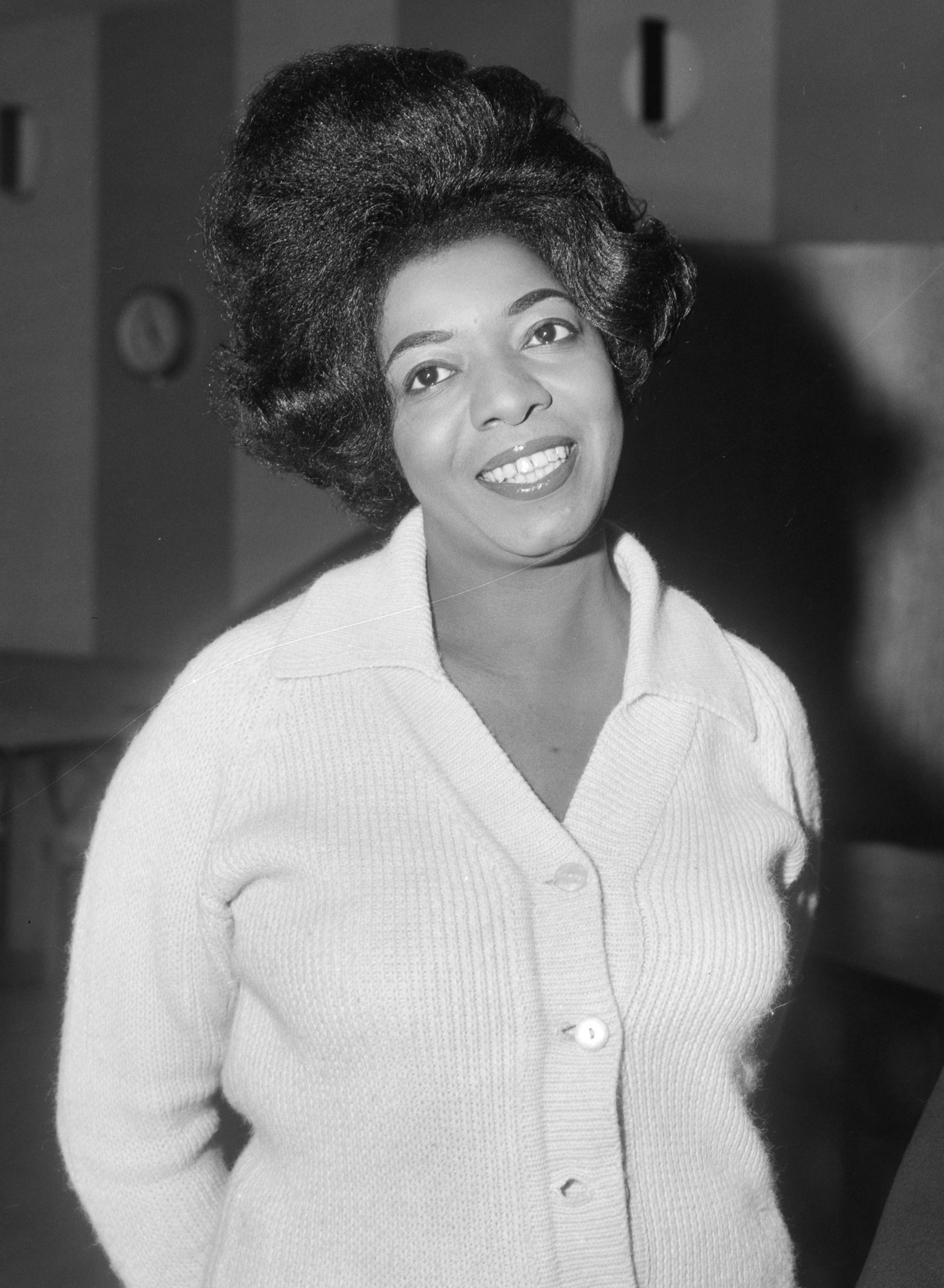 Dakota Staton (Amerikaanse zangeres) zal optreden voor AVRO televisie, Dakota Station